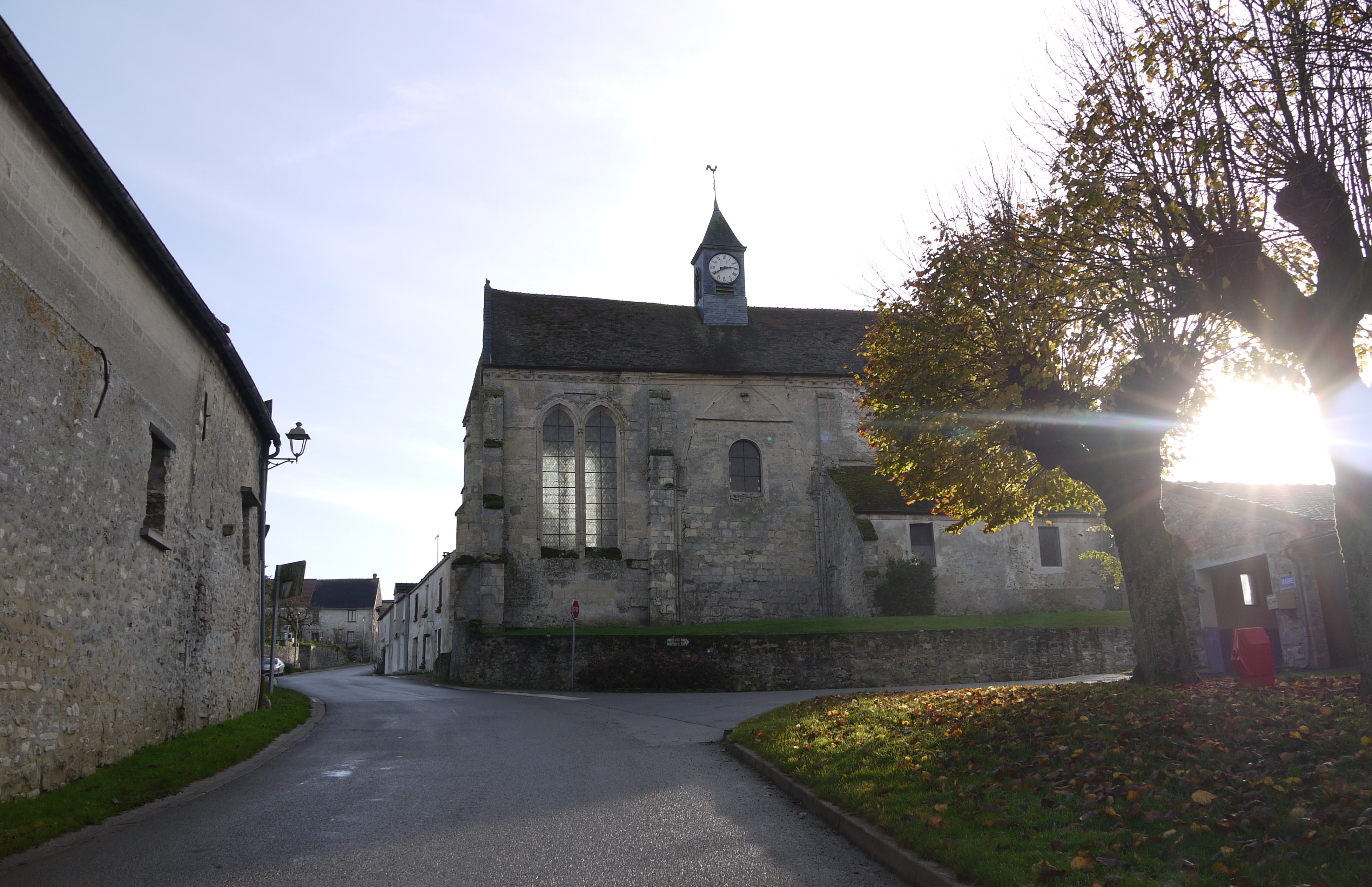 L'église Saint-Jean-Baptiste de Priez (Aisne)